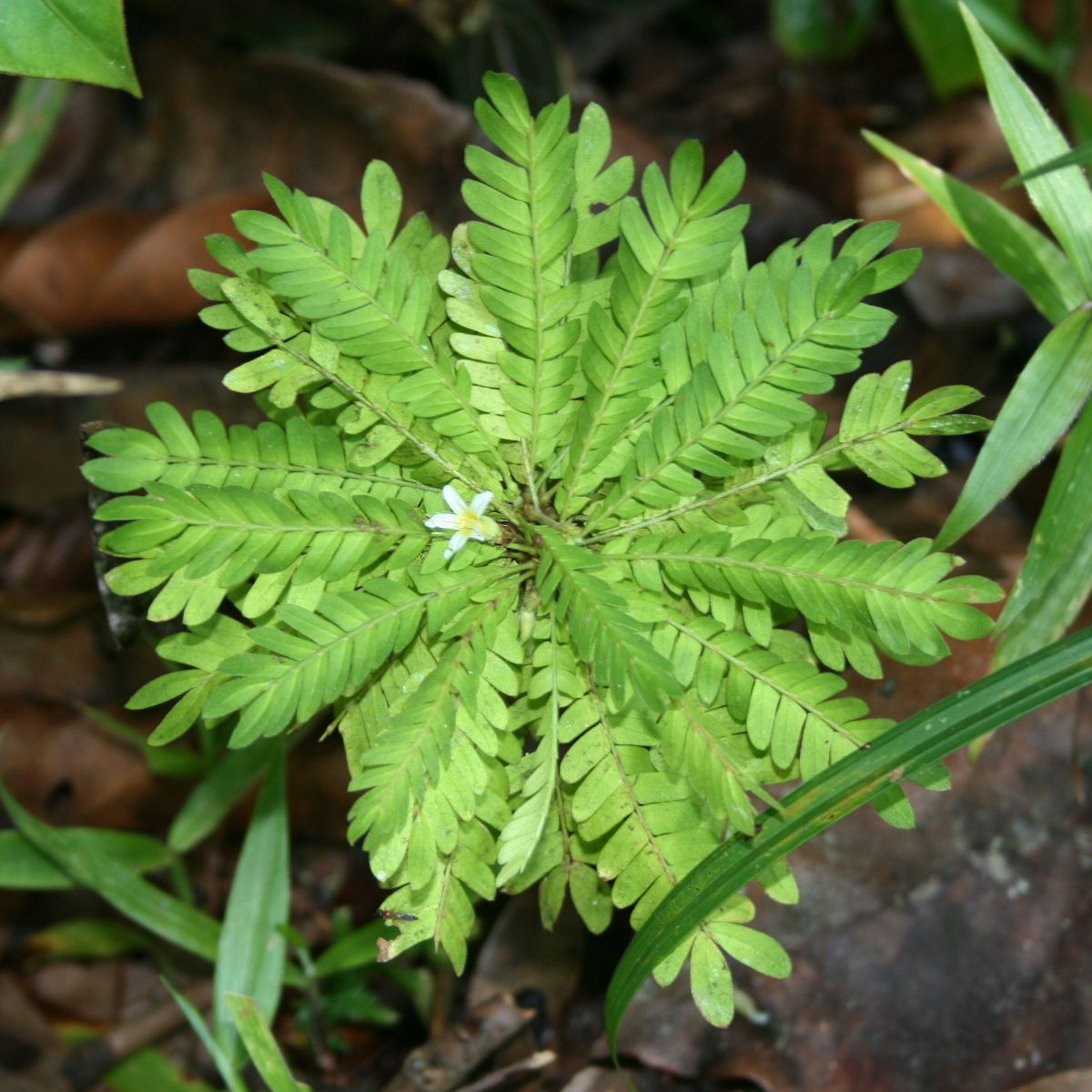 Biophytum dendroides, Sauerkleegewächse (Oxalidaceae) - Costa Rica: Prov. Puntarenas, La Gamba NW Golfito, zwischen "Fila Trail" und Valle Bonito